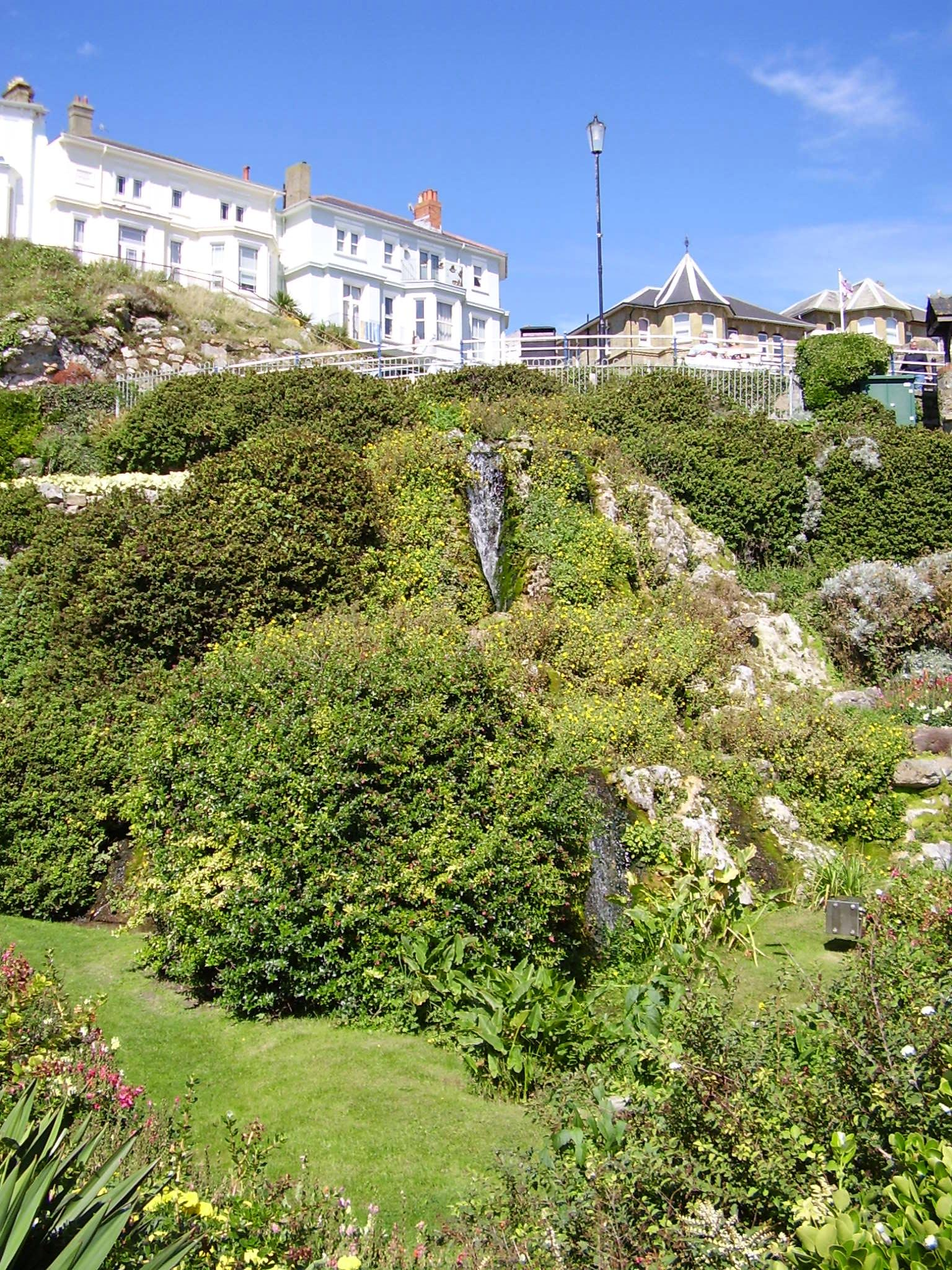 Ventnor Cascade